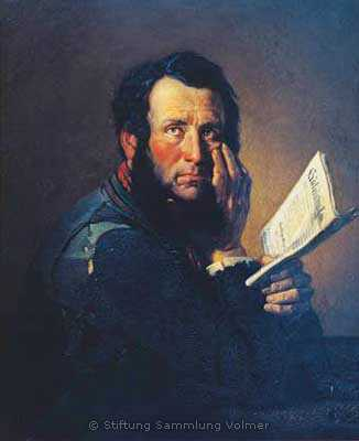 Selbstporträt Wilhelm Kleinenbroich. Er hält die „Kölnische Zeitung“ in der Hand